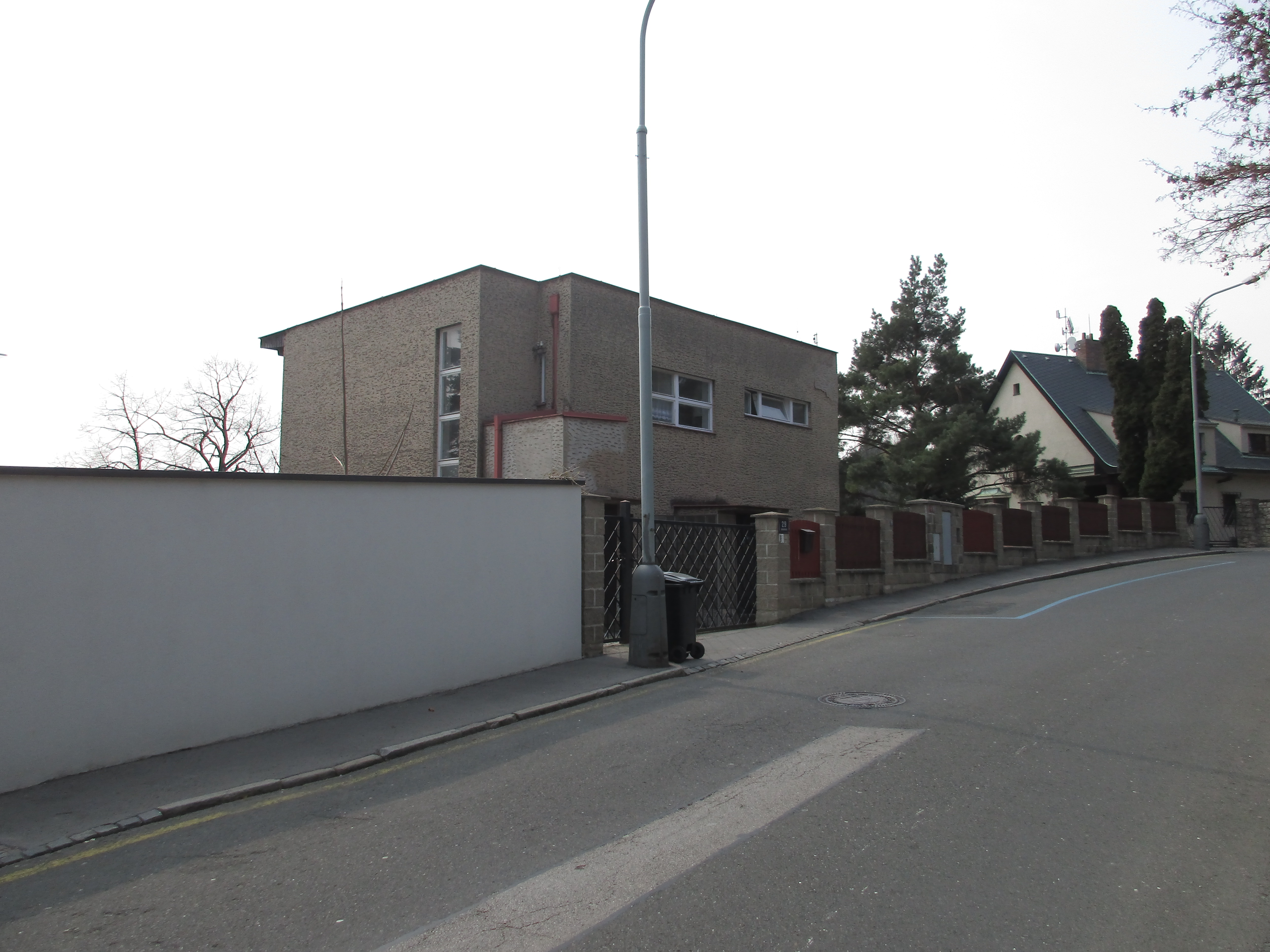 Barrandovská 385/29, Praha 5-Hlubočepy